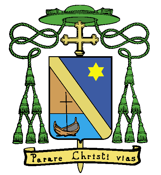 Stemma Diocesi Oppido - Palmi